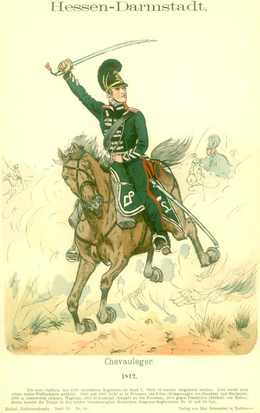 Hessische Chevaulegers um 1812